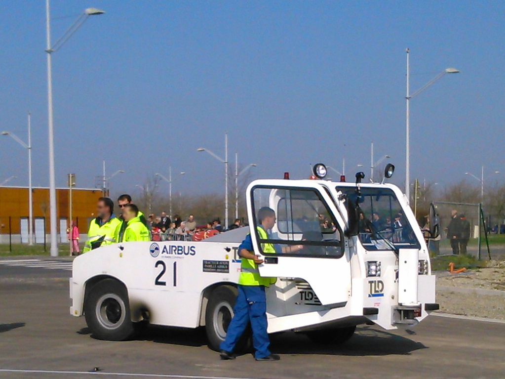 TLD pushback tractor used generally for Airbus A320.